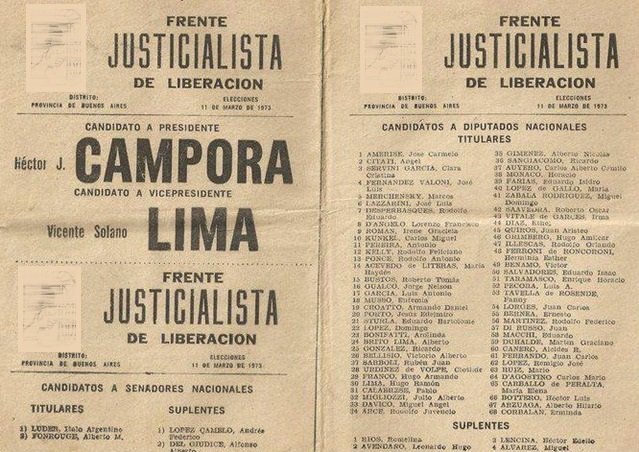 Boleta electoral del FreJuLI con la fórmula de Cámpora-Lima en 1973. Distrito Provincia de Buenos Aires.